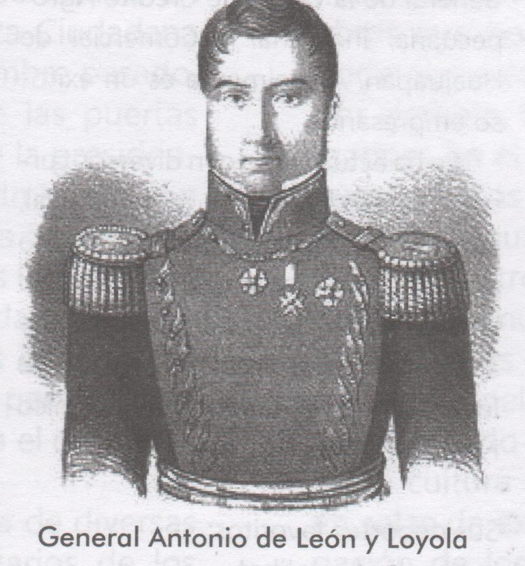 El gran general de huajuapan y benemerito de oaxaca Antonio de Leon y Loyola